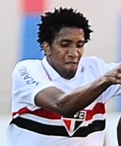 2012-09-02_Campeonato Brasileiro 2012_Série A_Bahia 1 x 0 São Paulo_Estádio Roberto Santos_PItuaçu